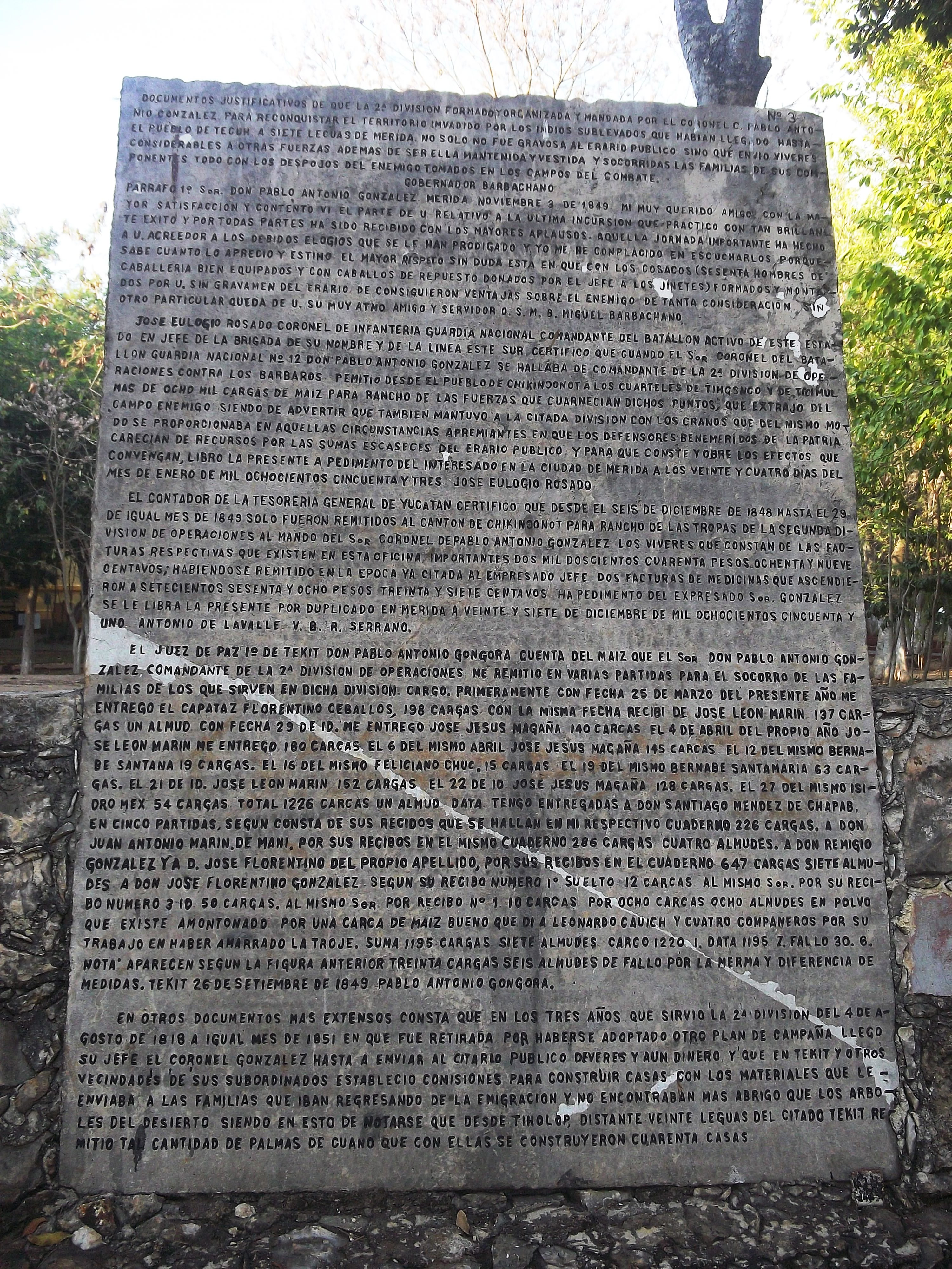 Parque Zoológico del Centenario en Mérida, Yucatán.